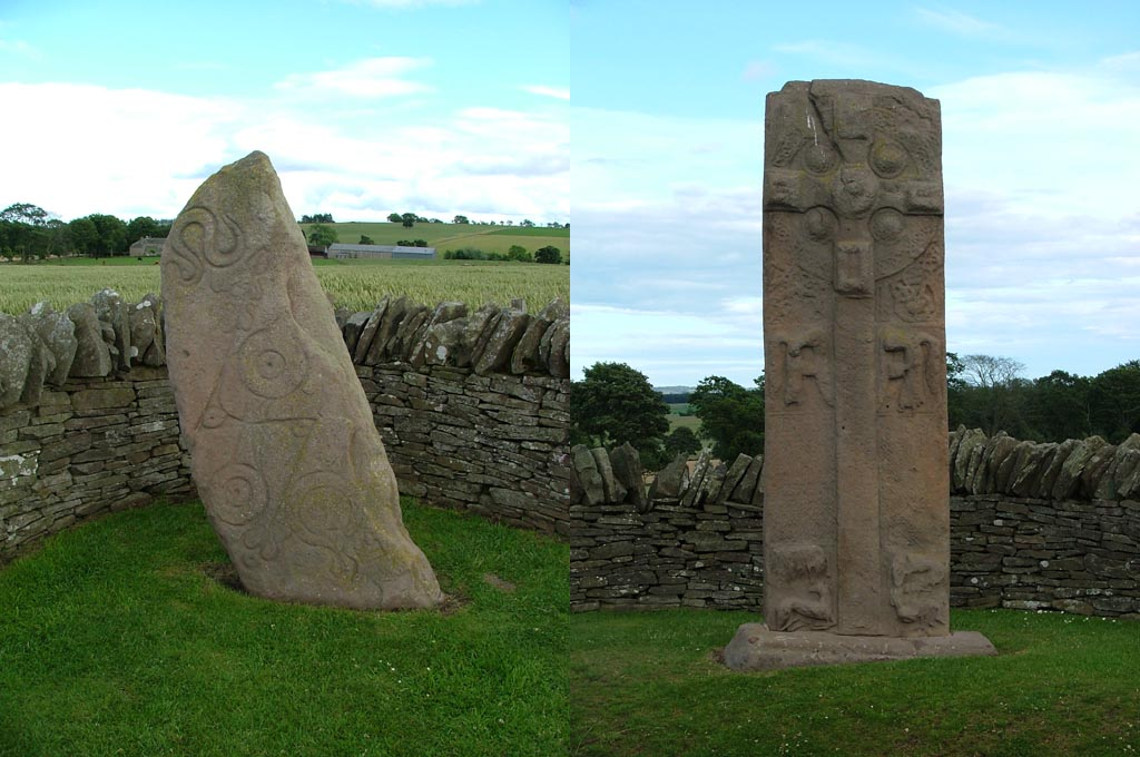 Pierre pictes d'Aberlemno, Écosse. A gauche, une pierre de classe 1 (uniquement symbolique). Un serpent en haut, un miroir et un peigne en bas A droite, une pierre de classe 2, mêlant symboles religieux chrétiens et symboles pictes similaires aux pierres de classe 1 (sur l'envers).